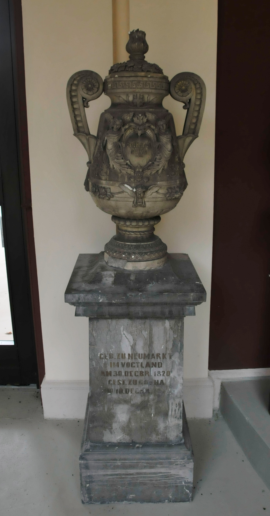 Urne von Karl Heinrich Stier im Gothaer Kolumbarium